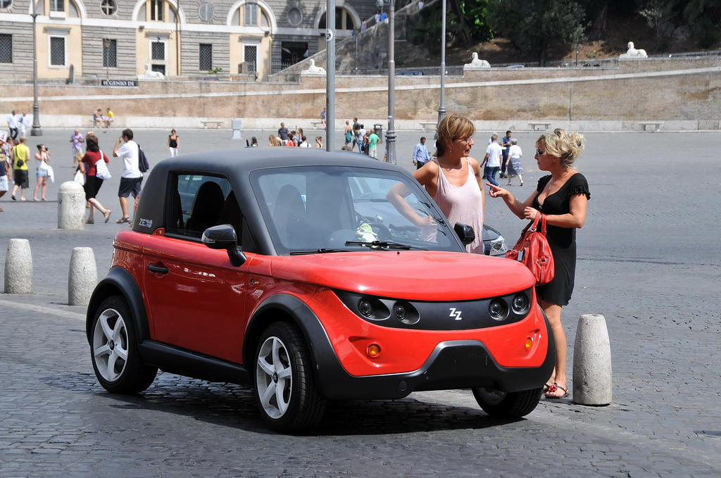 'Tazzari Electric'. Geheel electrische auto die in Italië gemaakt wordt. Via het Internet te koop voor net geen € 30.000